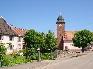 Village de Reppe (Territoire de Belfort) Photo prise en mai 2004 par LP90 Licence GFDL LP90